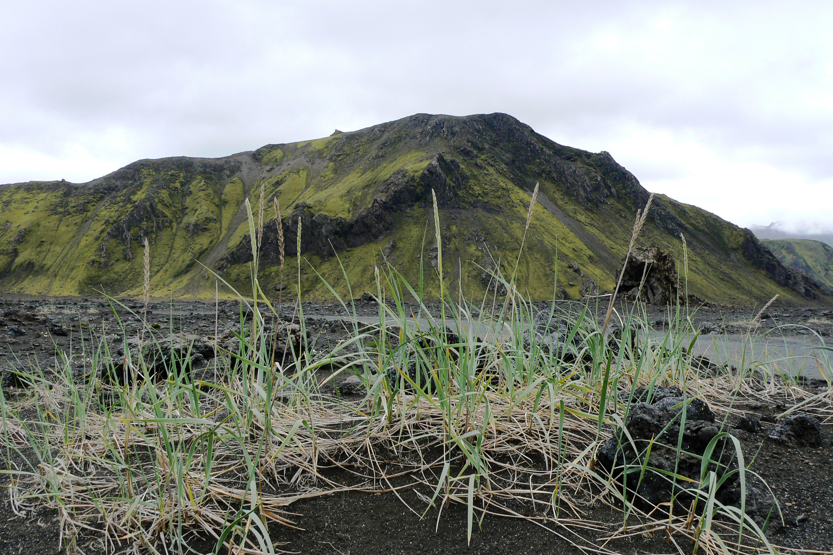 Elyme des sables